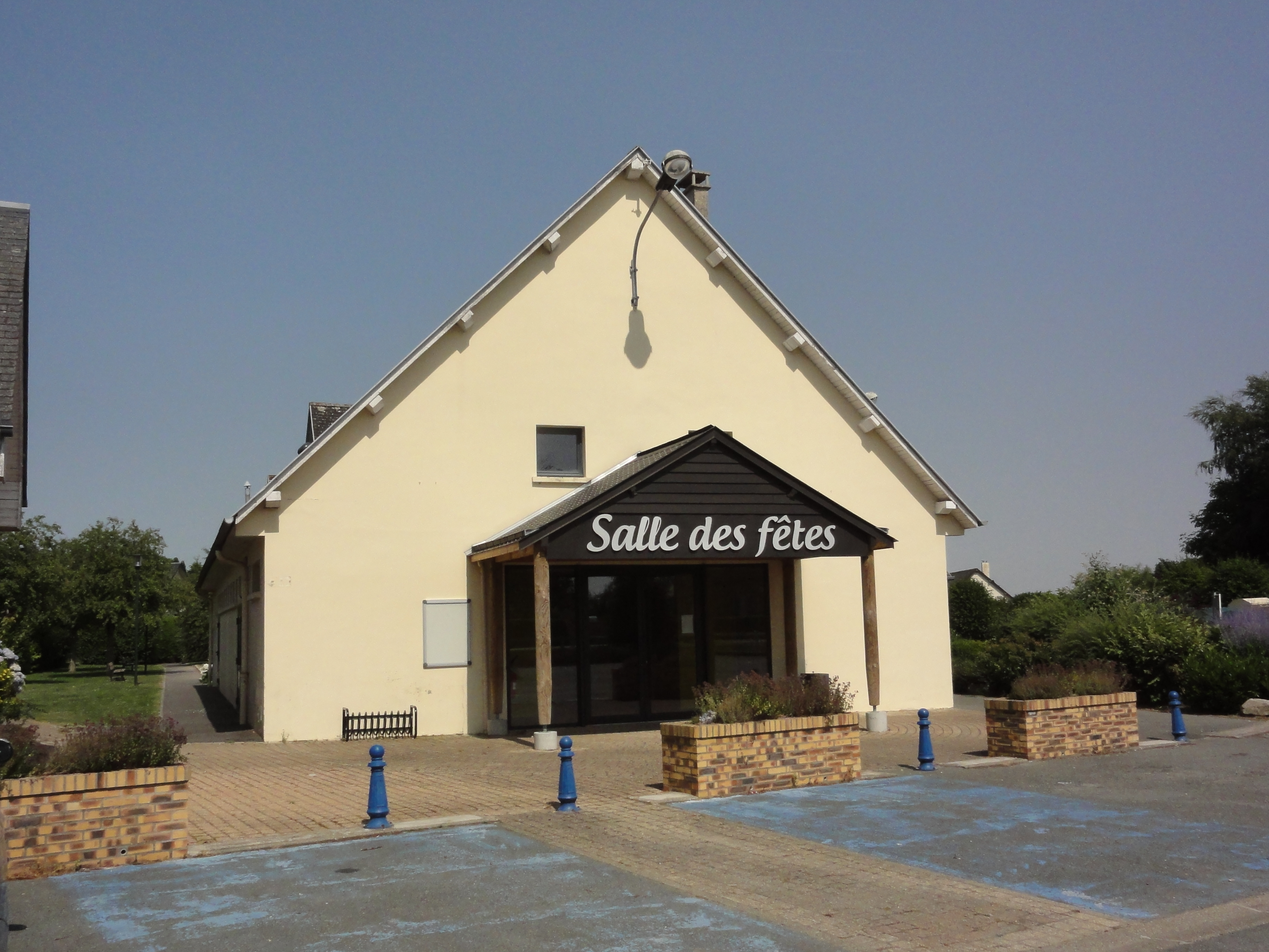 Ypreville-Biville (Seine-Mar.) salle des fêtes